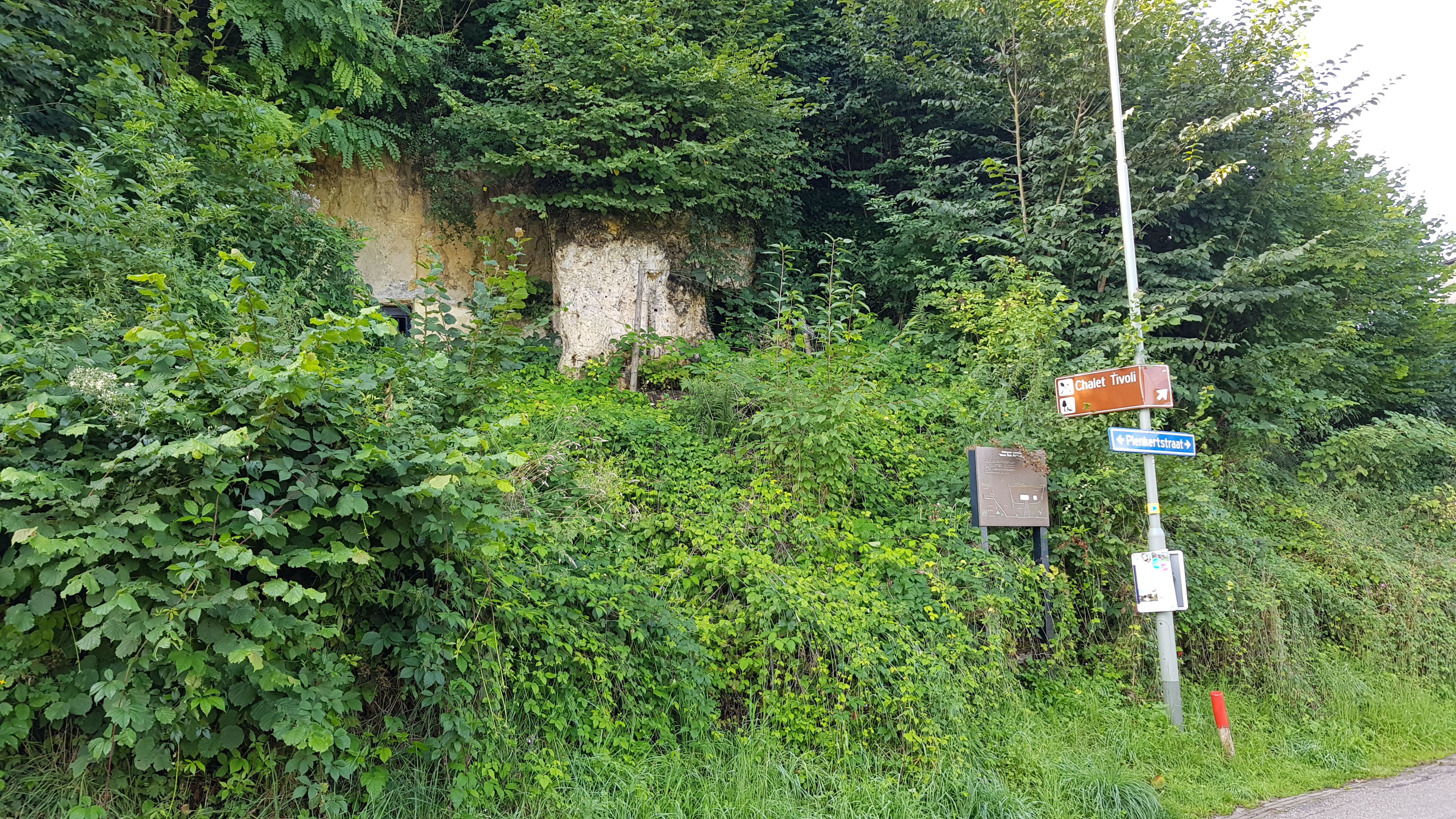 Groeve Einde Plenkertweg, Valkenburg, Limburg, Nederland